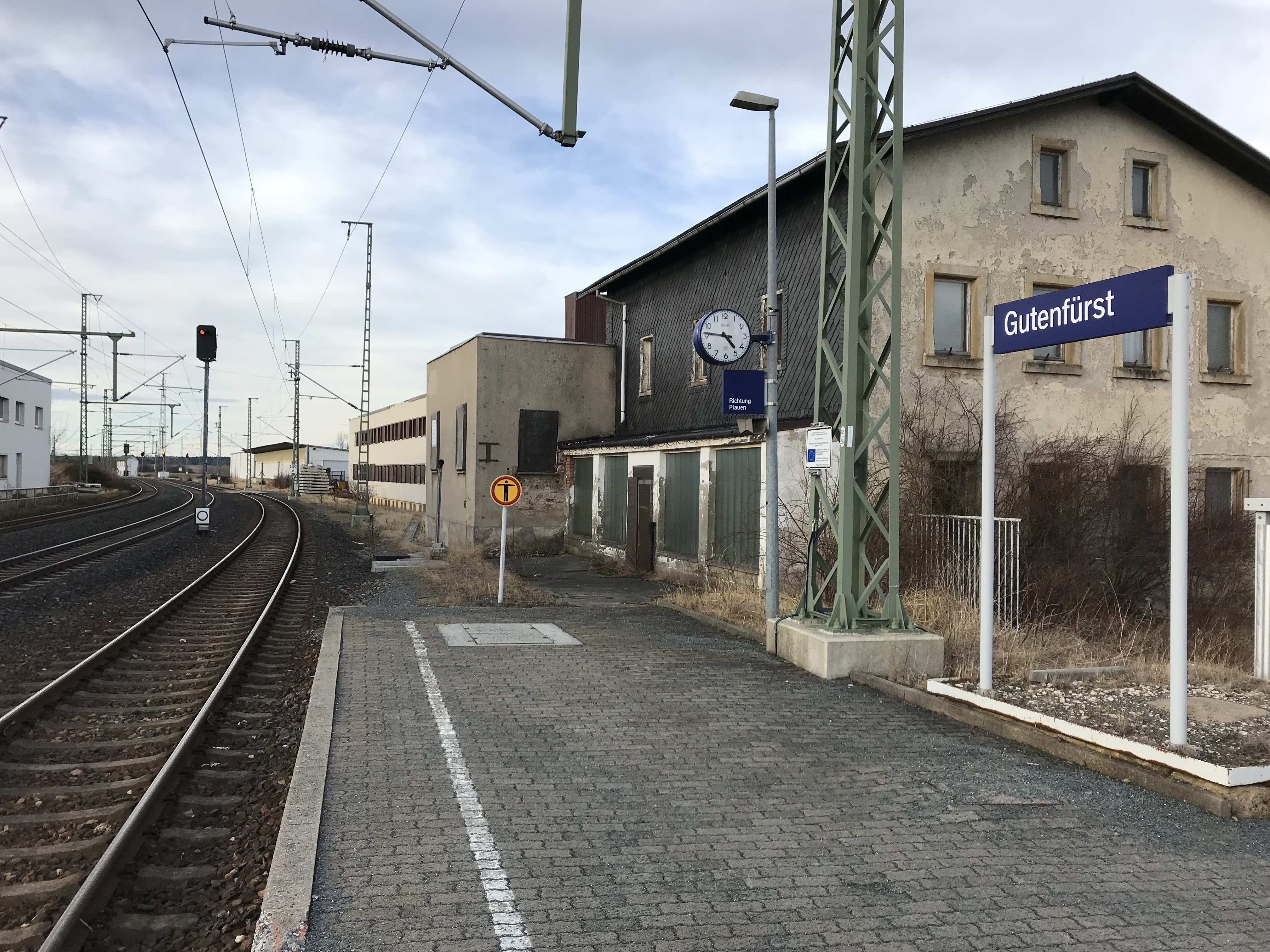 Bahnhof Gutenfürst (2018)